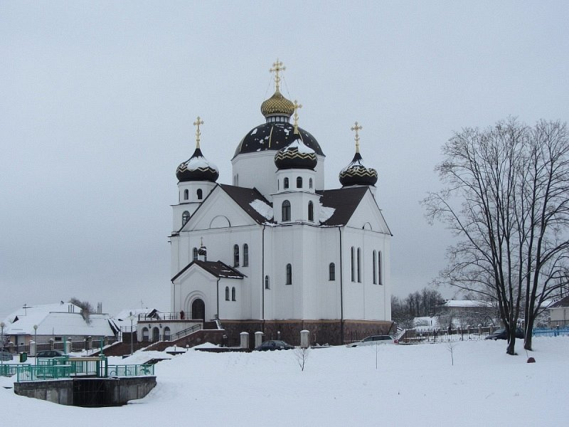 Смаргонь. Спаса-Праабражэнская царква ўзімку